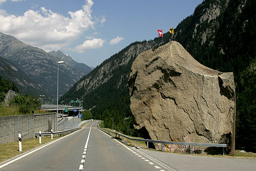 Der 12 m hohe Teufelsstein (220 t) bei Göschenen